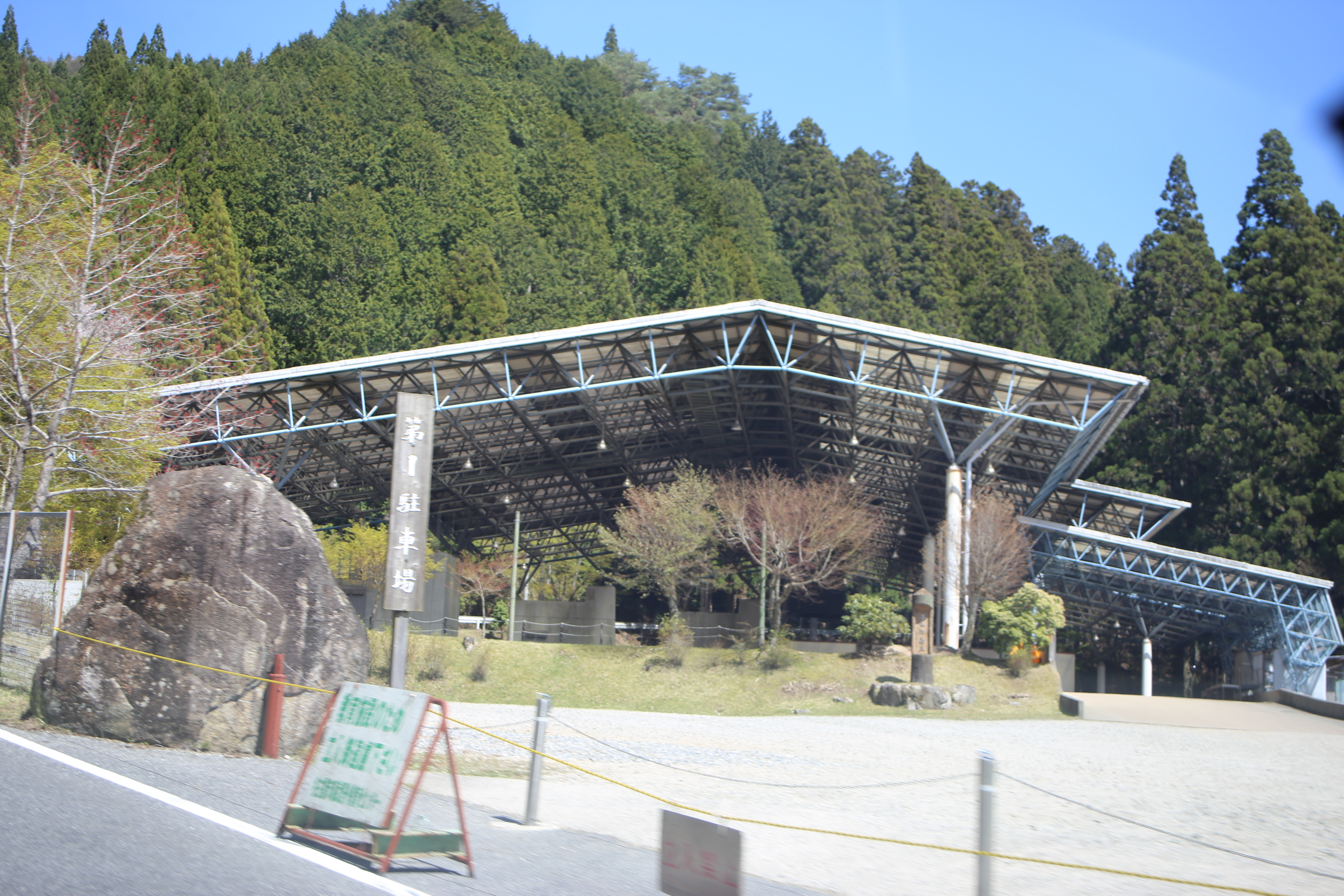 愛知県豊田市稲武町井山の名古屋市稲武野外教育センター 多目的ホール キャンプファイヤーなどが行われる